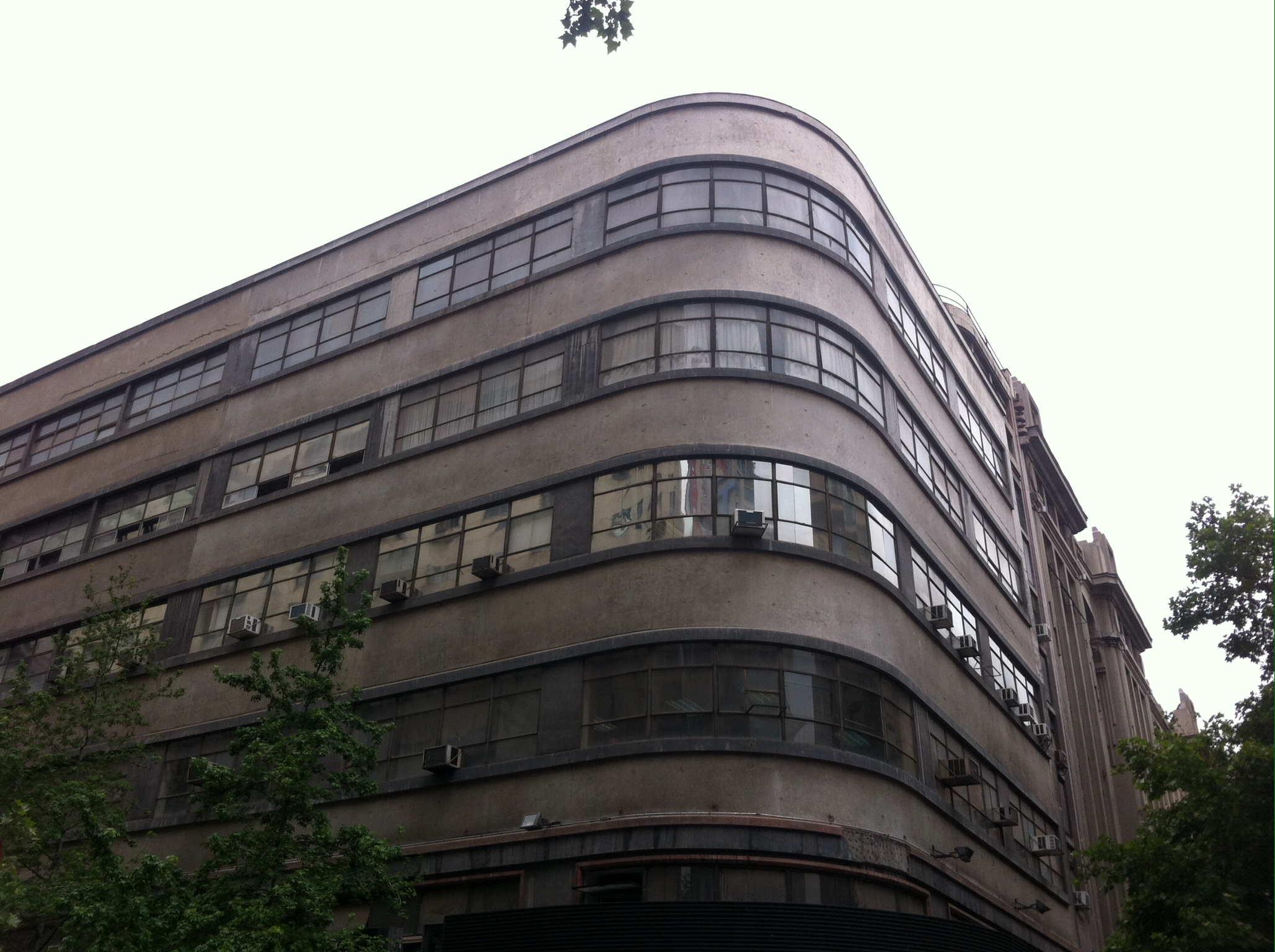 Edificio Oberpaur, del arquitecto Sergio Larraín García-Moreno. Ubicado en Huérfanos con Estado, Santiago de Chile.